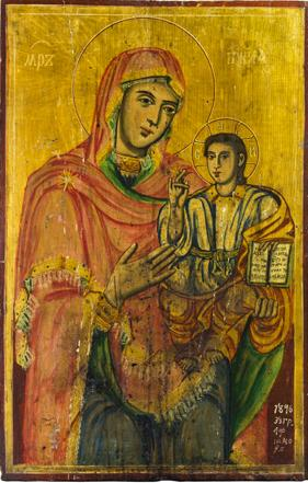 Богородица со Христос, црква Св. Теодор Тирон, с. Јанчиште. 1896 година. Автор Јаков Радев Мажовски од Лазарополе. Дим: 73,5 Х 49 Х 2 см.